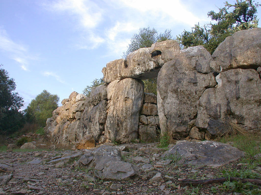 portal del poblado talayótico de Ses Paisses, Mallorca.